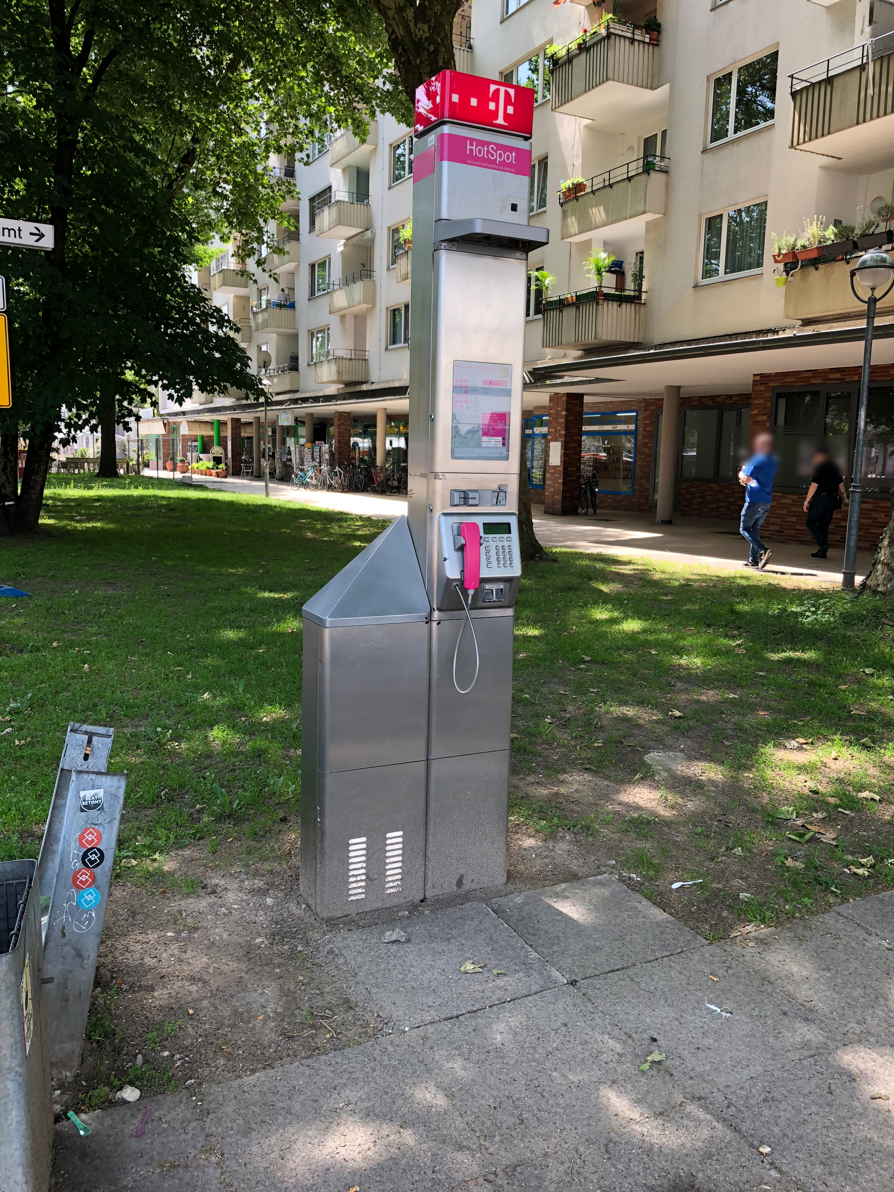 LTE Small Cell in einer Telefonzelle der Deutschen Telekom, an der Ettlinger Straße in Karlsruhe